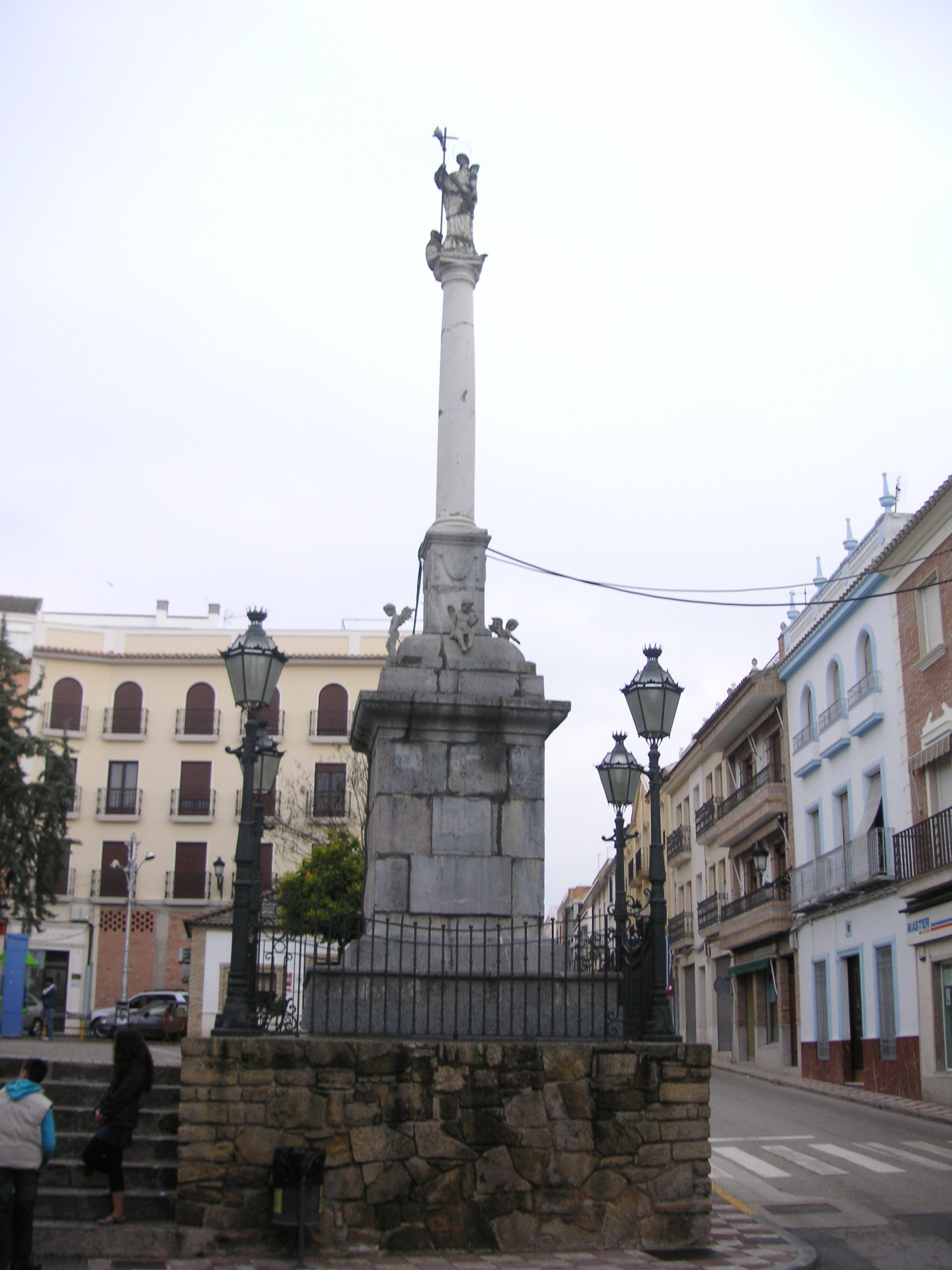 Fernán Núñez (Córdoba): El Triunfo